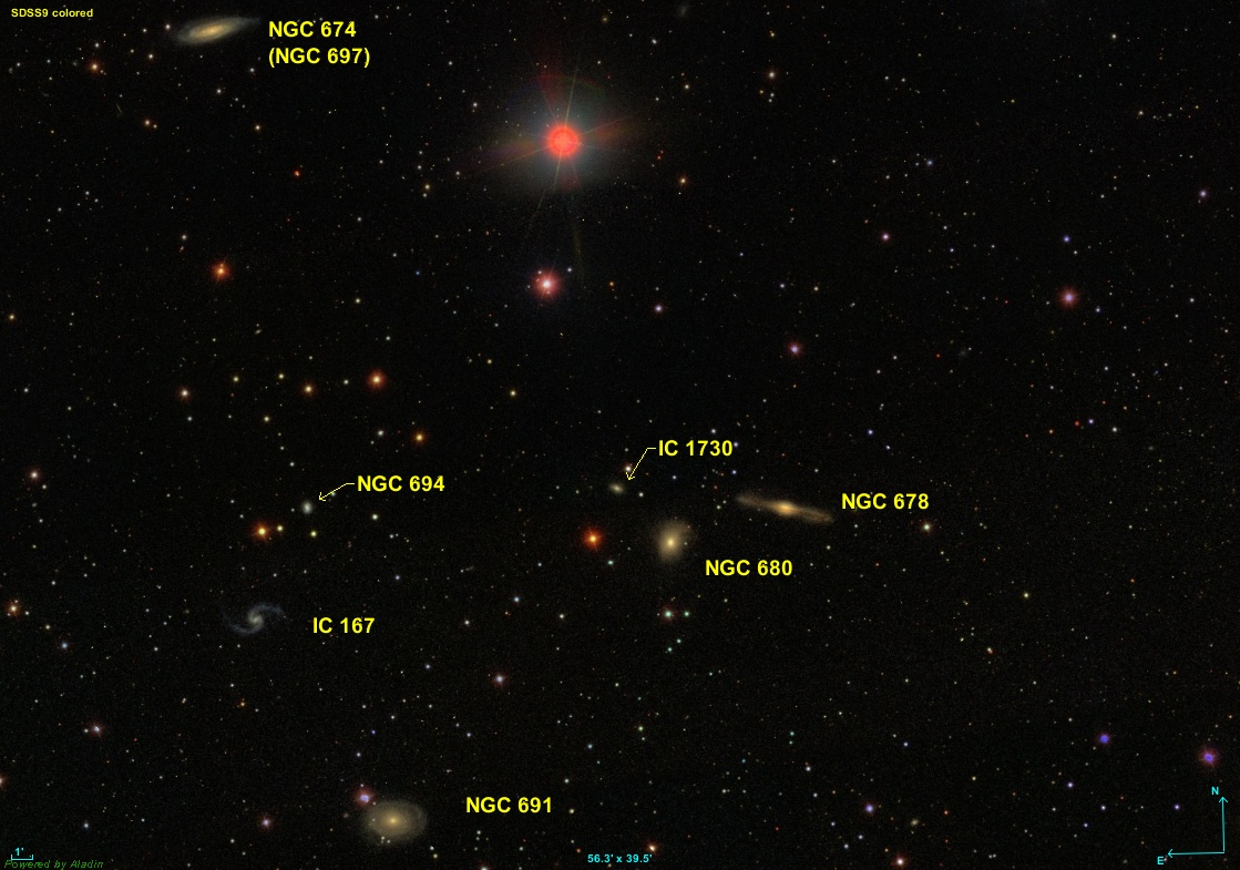 Groupe de NGC 691. NGC 674 par SDSS Plus de détails Image créée à l'aide du logiciel Aladin Sky Atlas du Centre de Données astronomiques de Strasbourg et des données de SDSS (Sloan Digital Sky Survey).